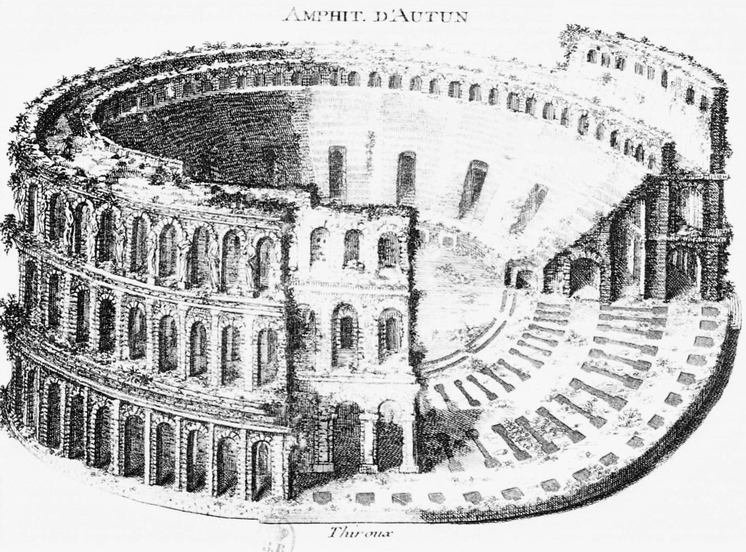 Représentation de l'amphithéâtre antique d'Autun.